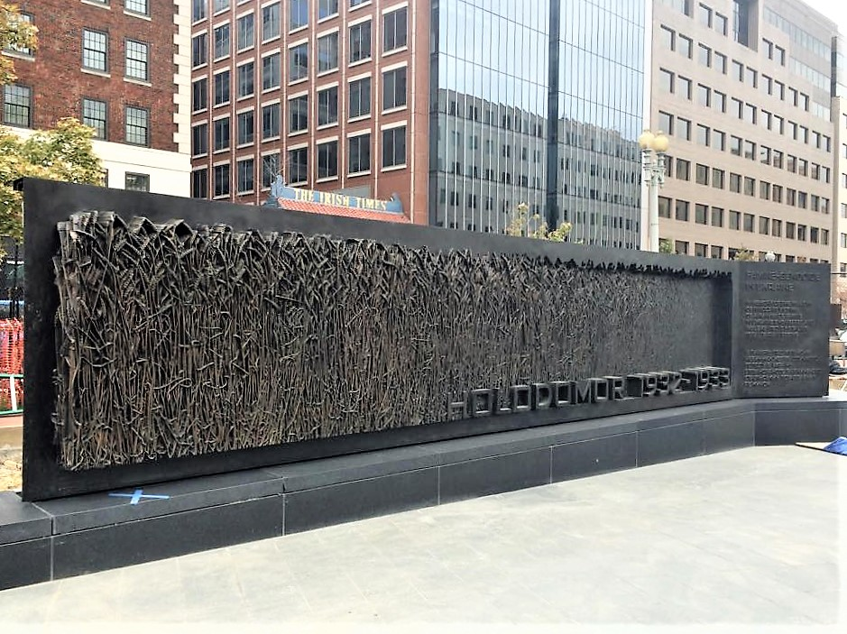 Field of Wheat - Washington memorial to victims of genocidal famine in Ukraine